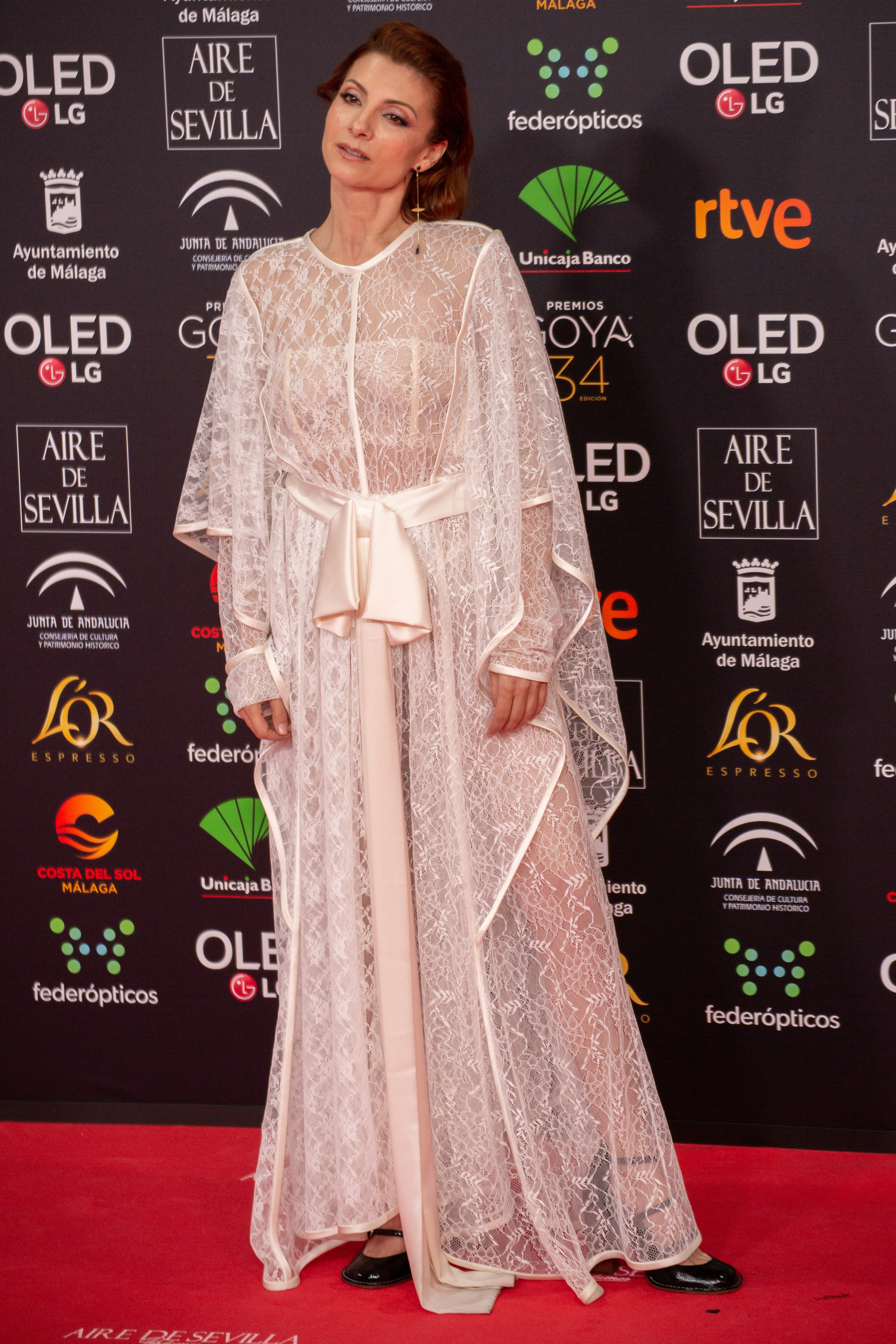 Najwa Nimri en la alfombra roja de la ceremonia de entrega de los Premios Goya 2020, celebrados en Málaga